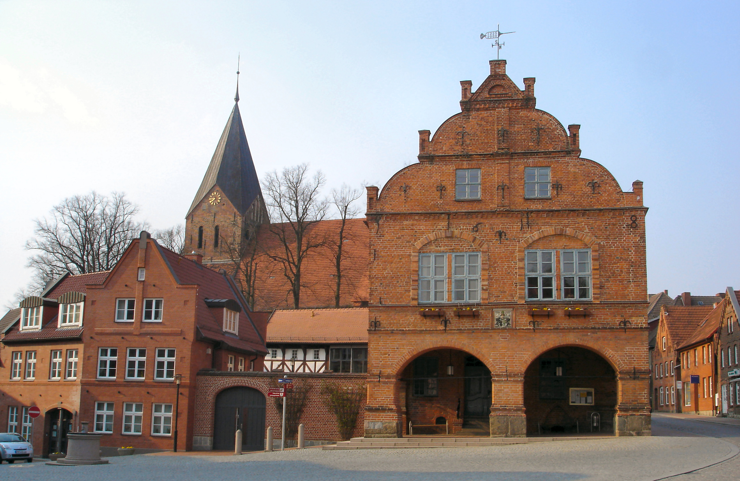 Rathaus und Kirche in Gadebusch / Townhall and Church in Gadebusch (Mecklenburg-Western Pomerania)